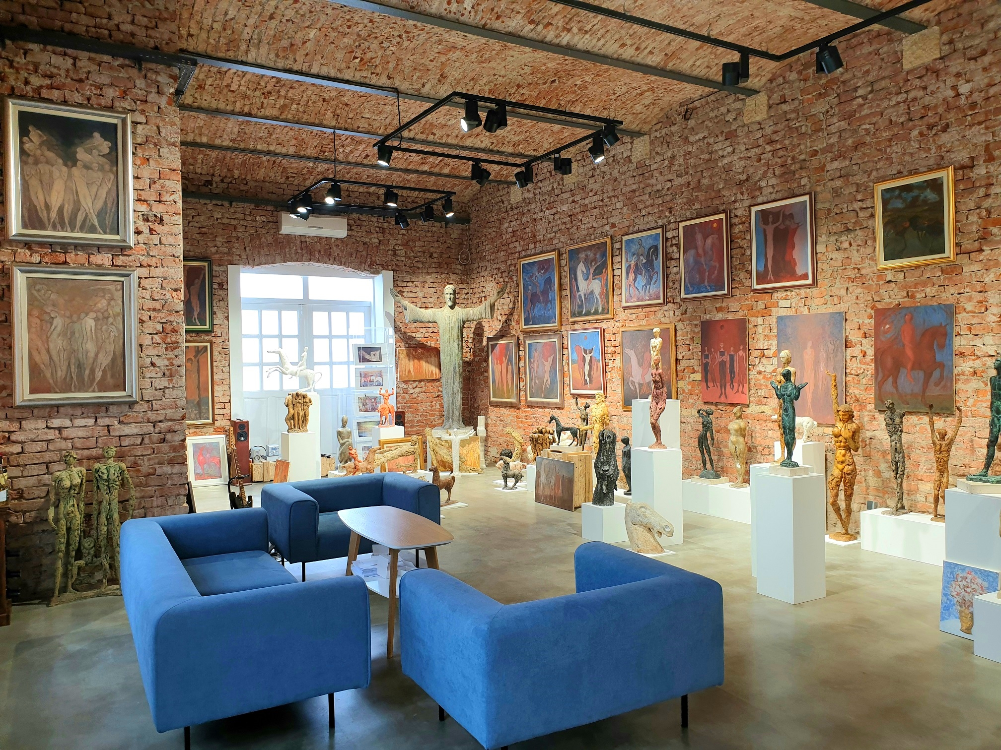 Atelje Josipa Konte, godina 2019